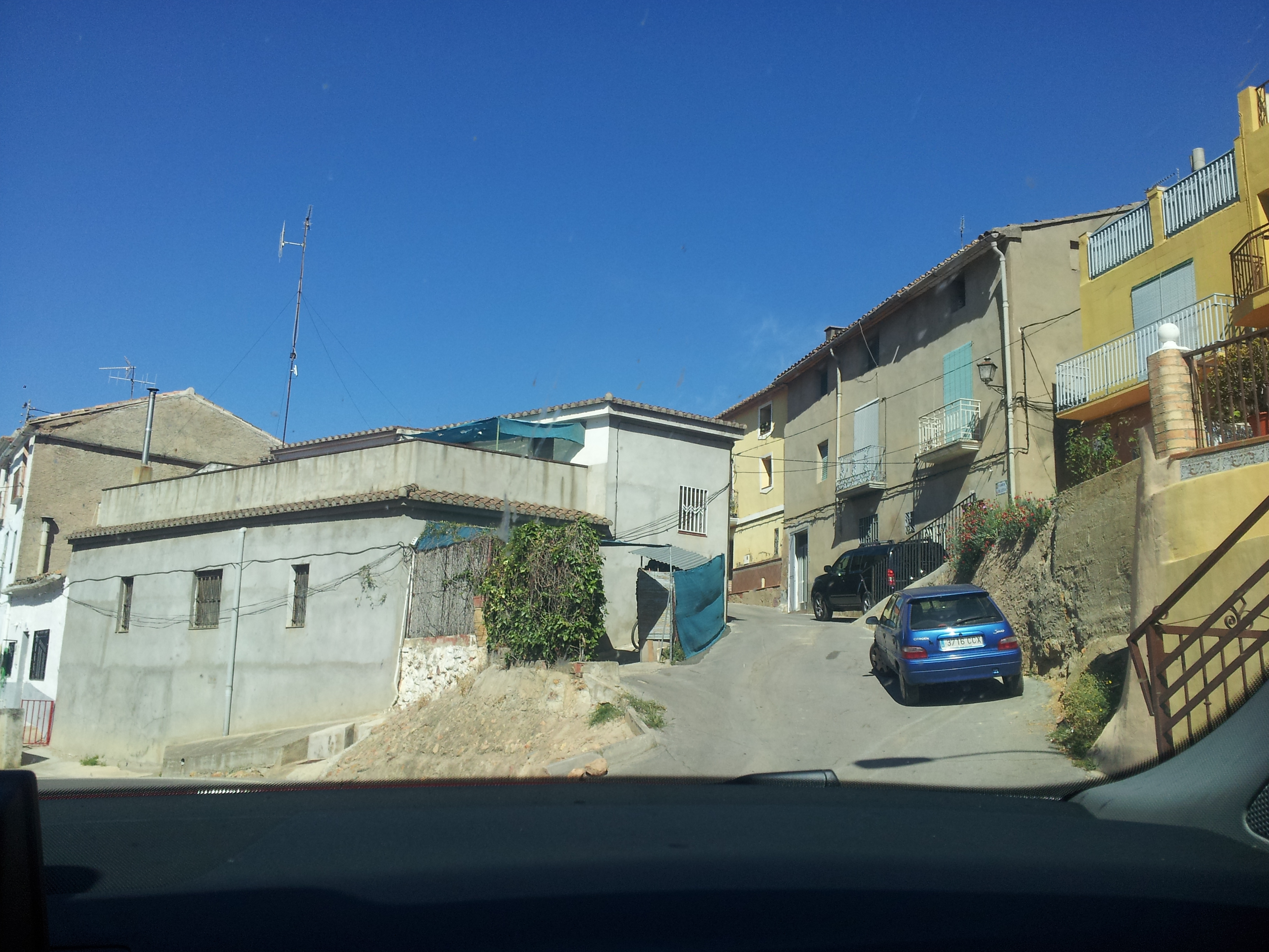 Carrer de la Vila